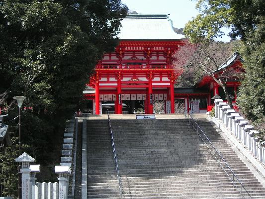 近江神宮の楼門。